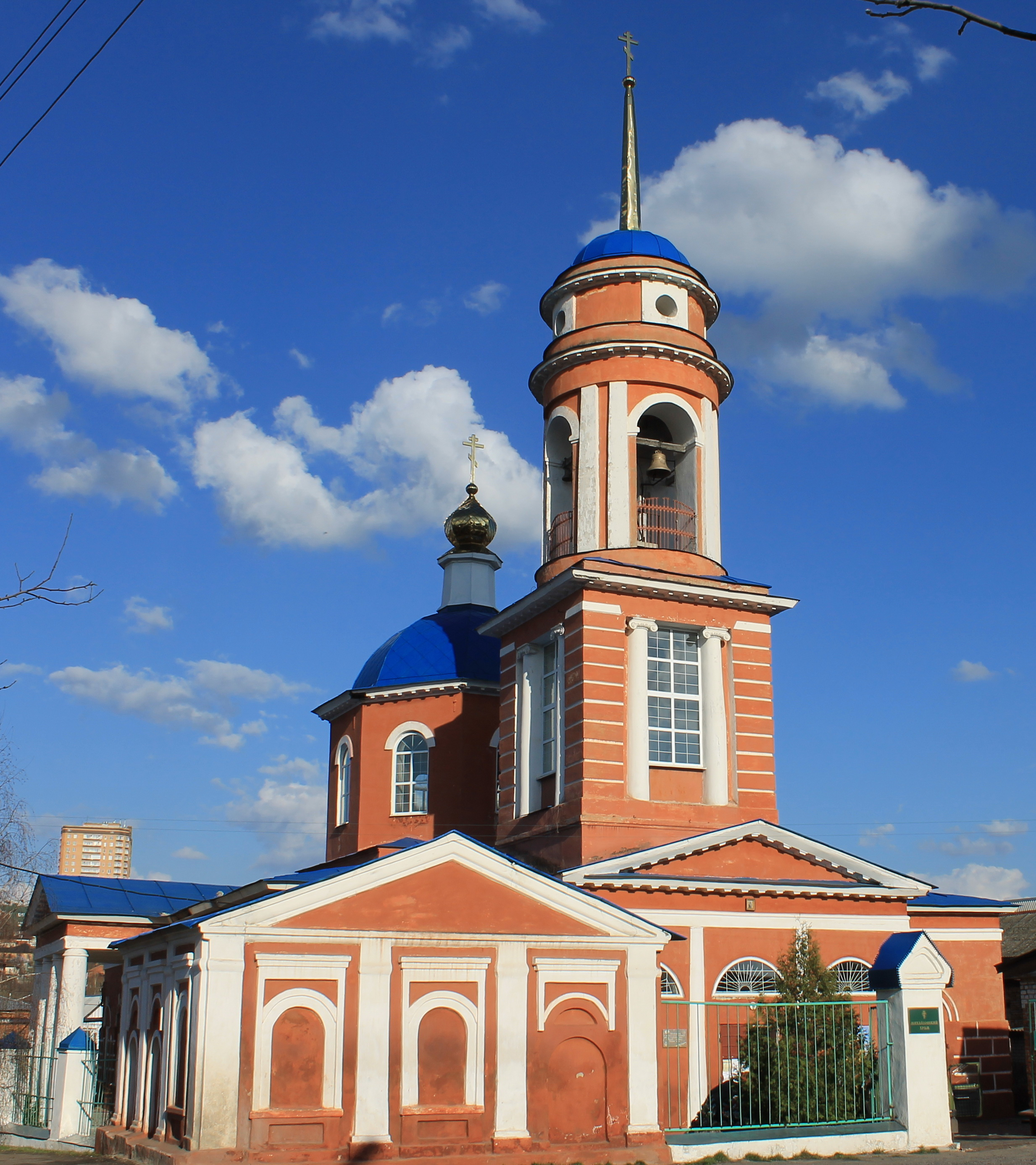 Храм Архангела Михаила в Курске